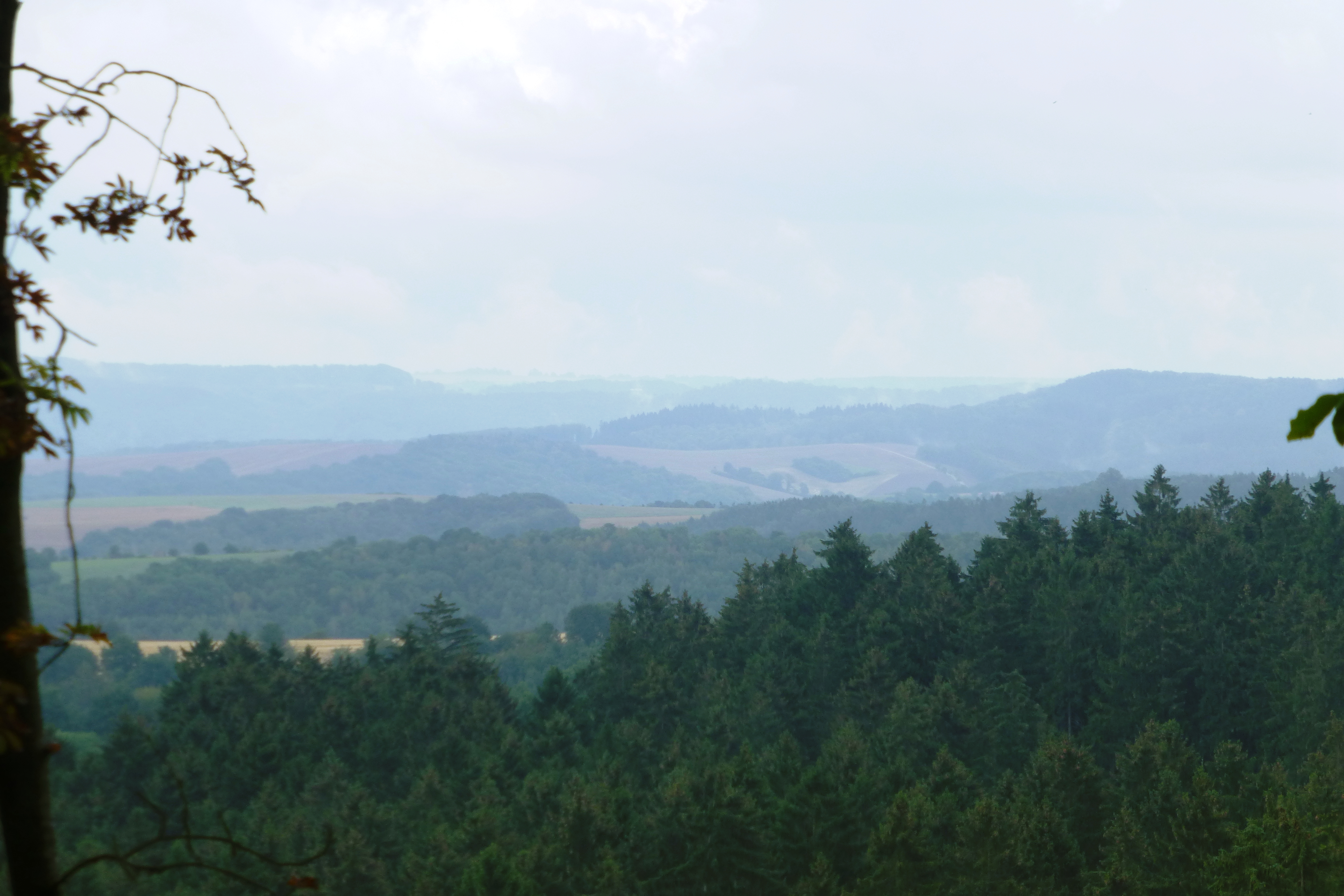 Ausblick vom Roten Berg nach Osten (im Hintergrund links das Ohmgebirge mit dem Fernstein und rechts der Zehnsberg mit der Zinkspitze)